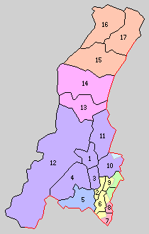 長野県北安曇郡の町村。